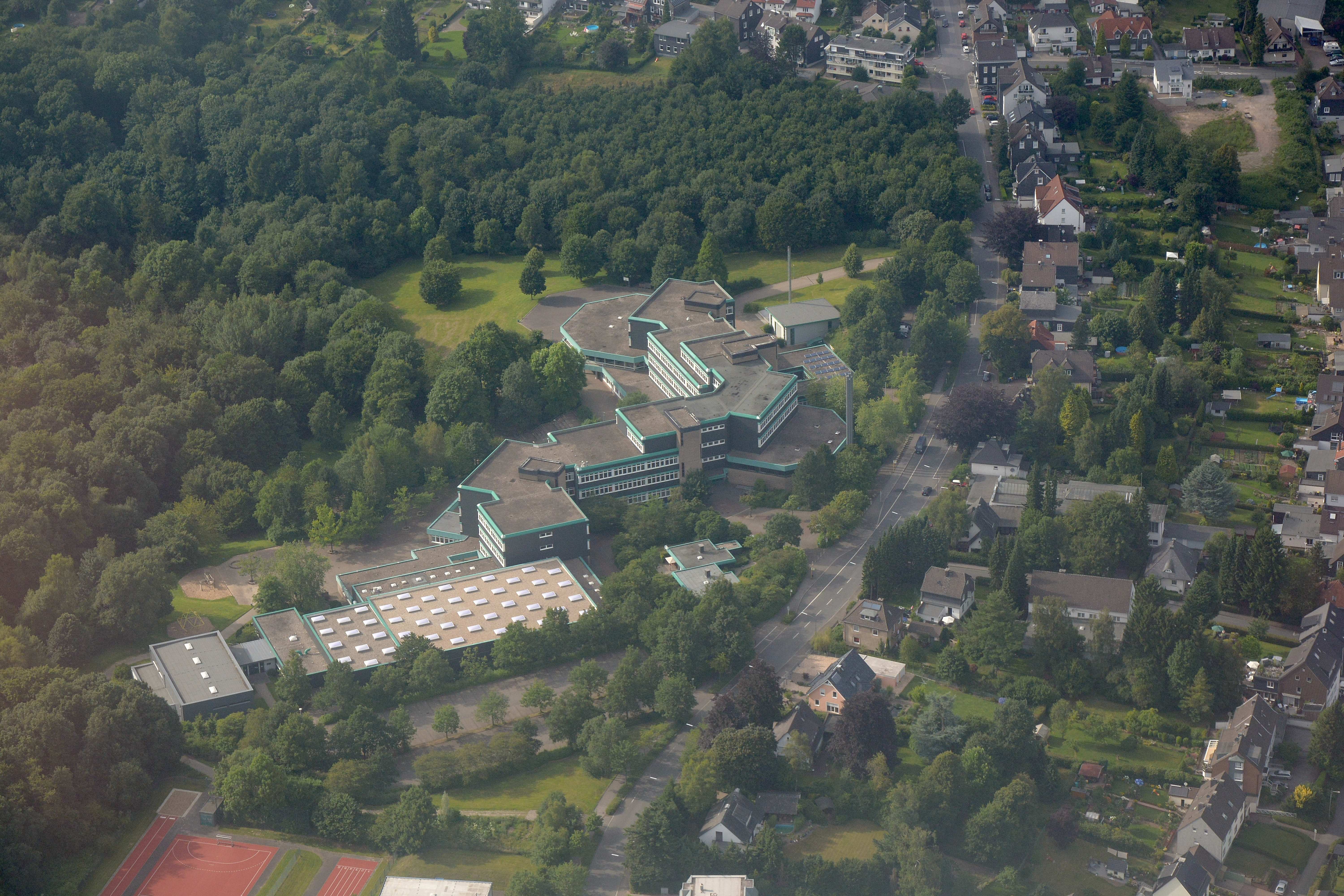 Erich-Fried-Gesamtschule an der Blutfinke in Wuppertal-Ronsdorf